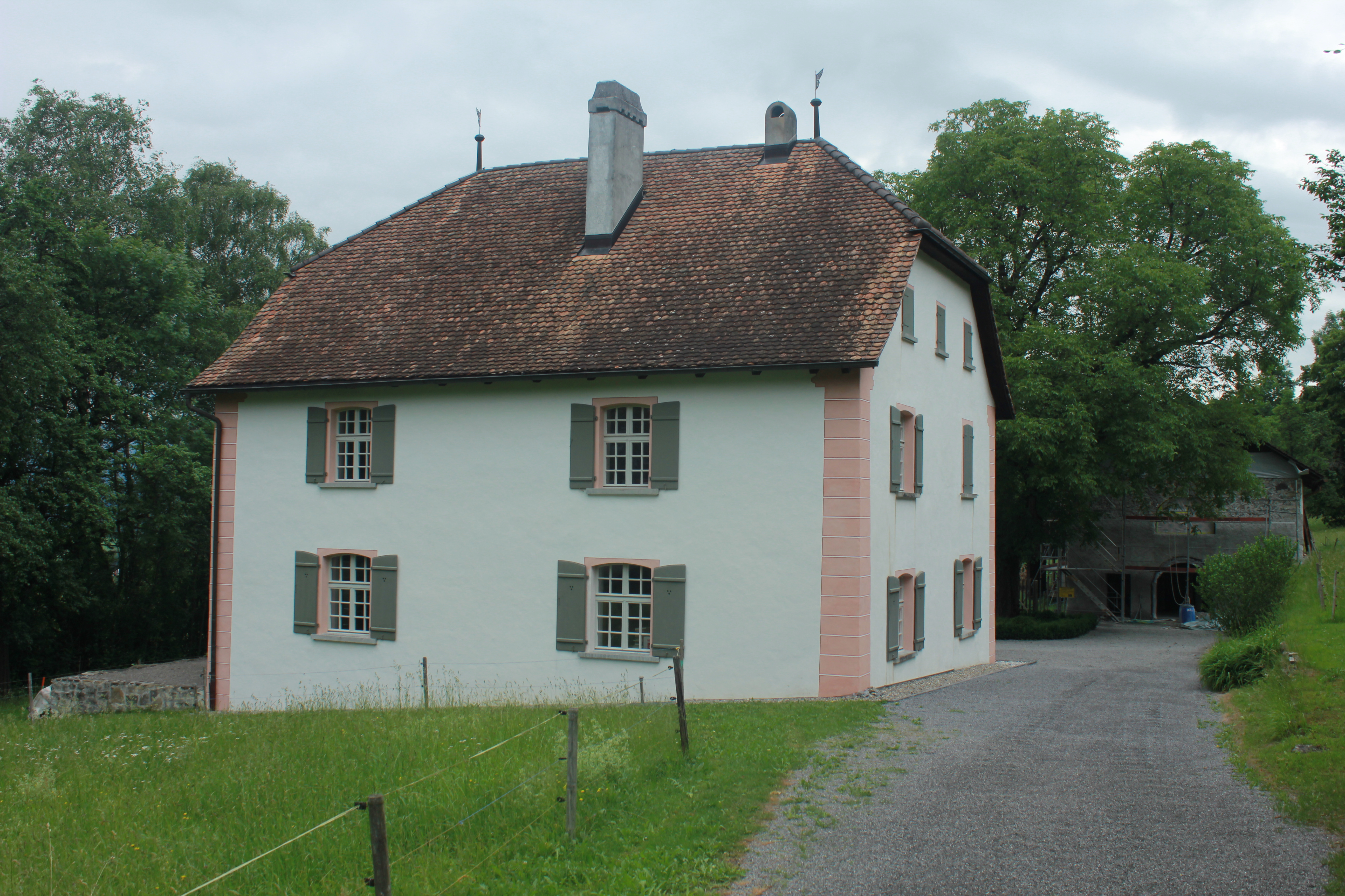 Wohngebäude im Vordergrund, Ökonomiegebäude im Hintergrund